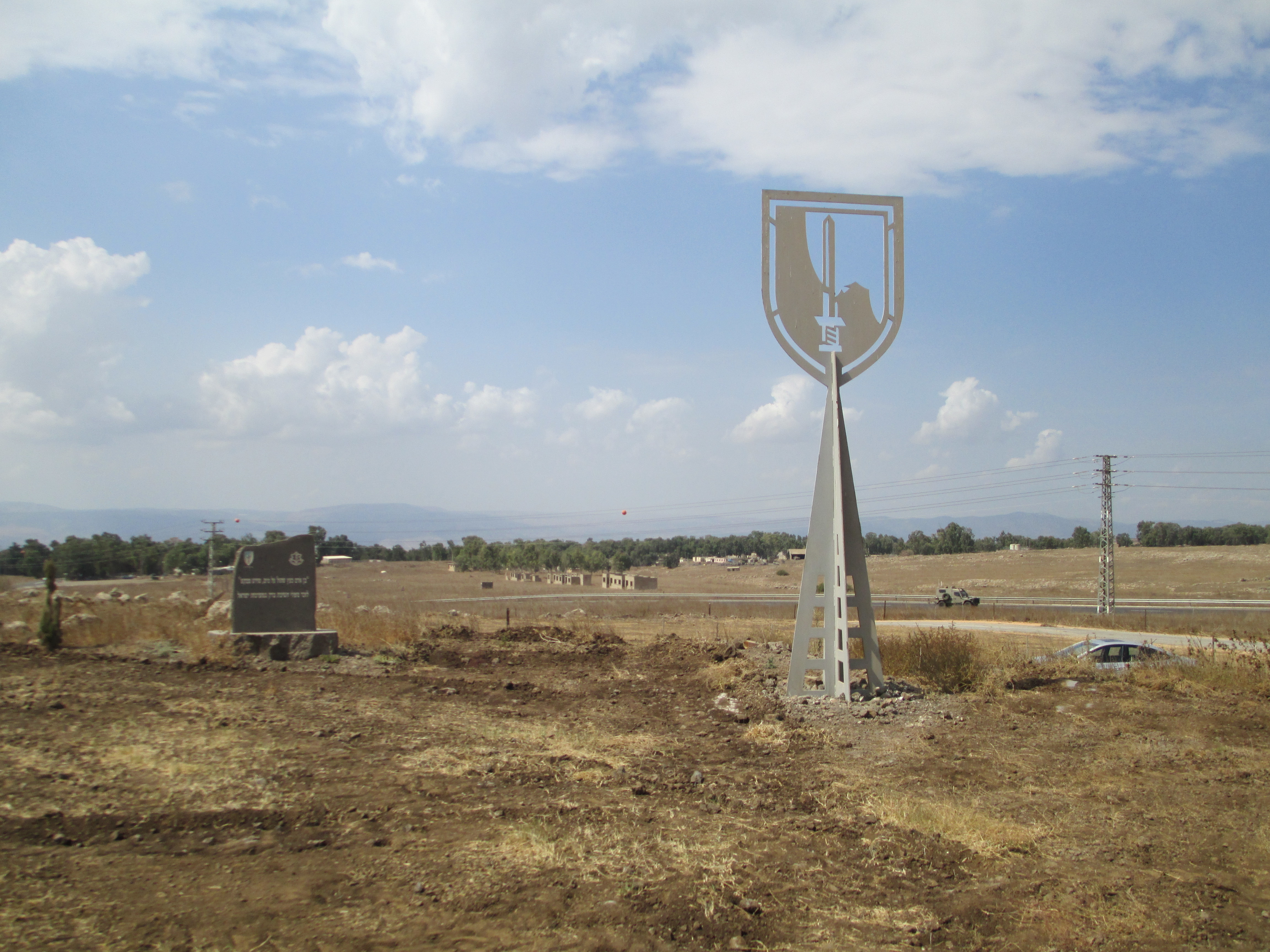 חורשת הנופלים של חטיבת ברק מול מחנה עלייקה ברמת הגולן